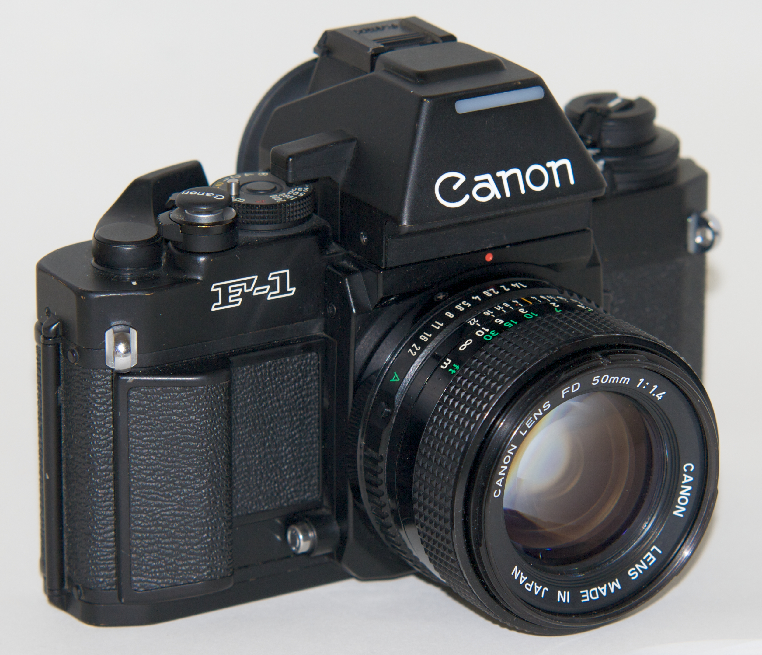 Canon New F-1 min 50mm 1,5 FD von rechts